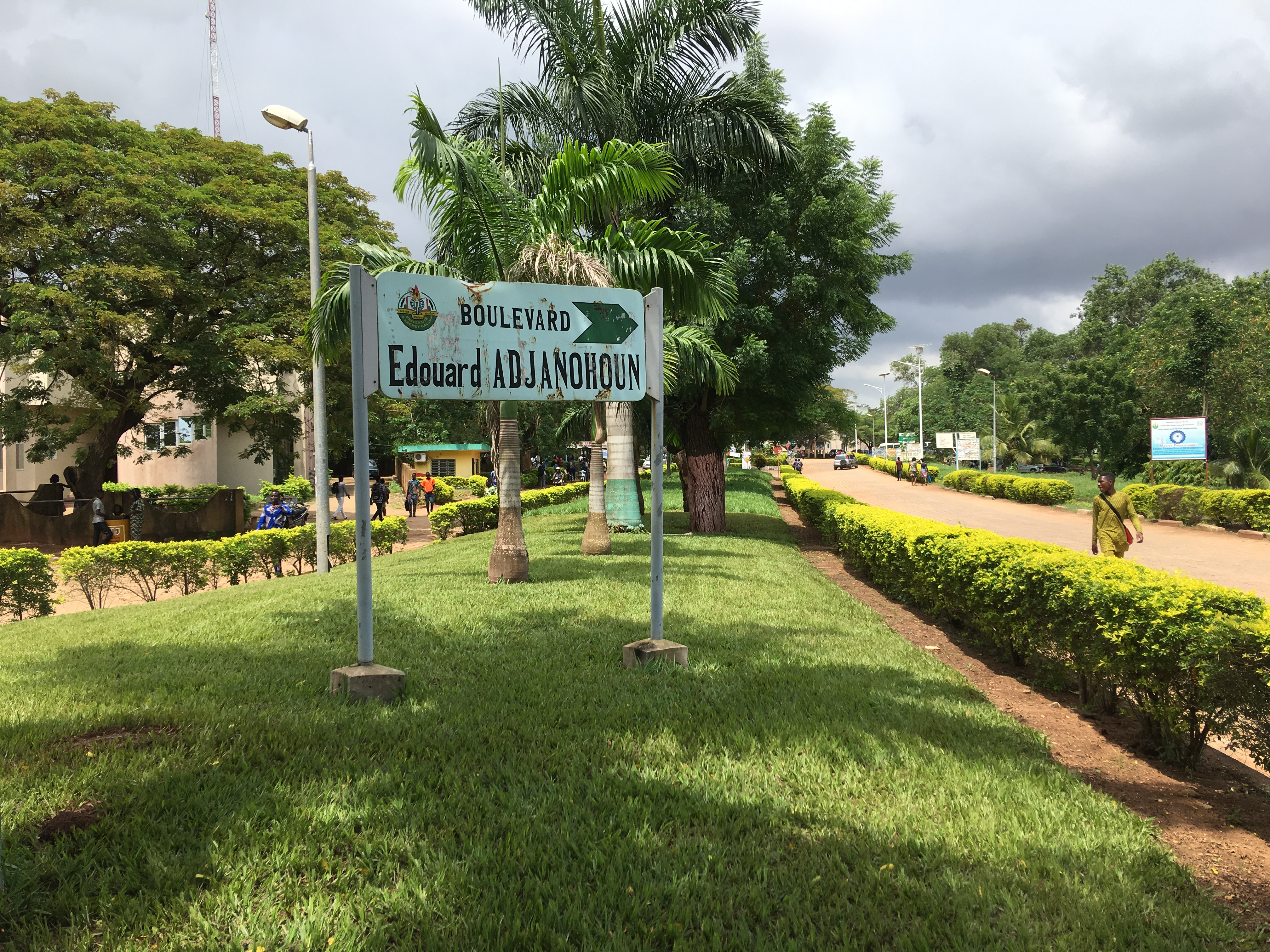 Boulevard Edouard ADJANOHOUN, à l'entrée du campus universitaire d'Abomey-Calavi